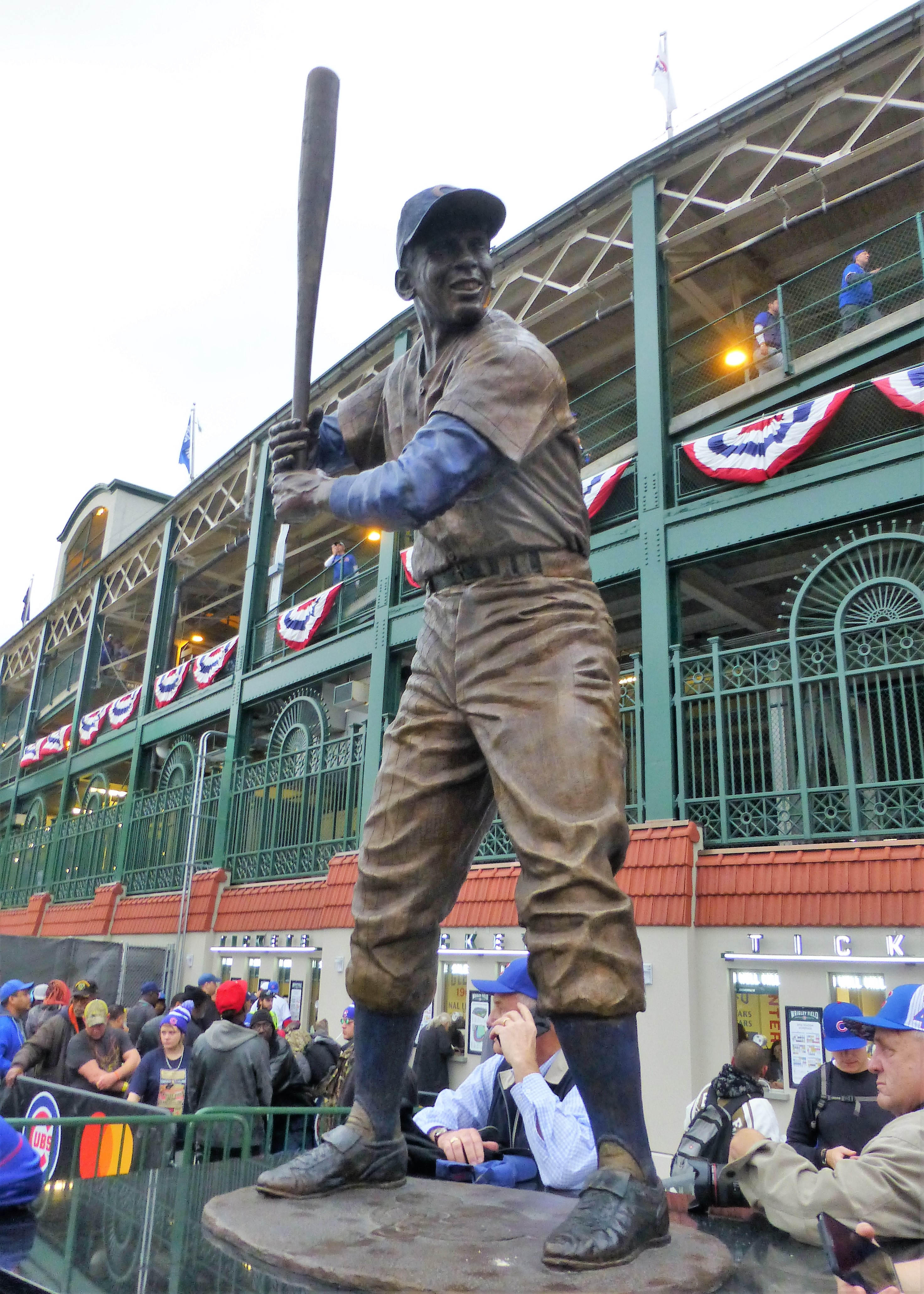 Ernie Banks Statue